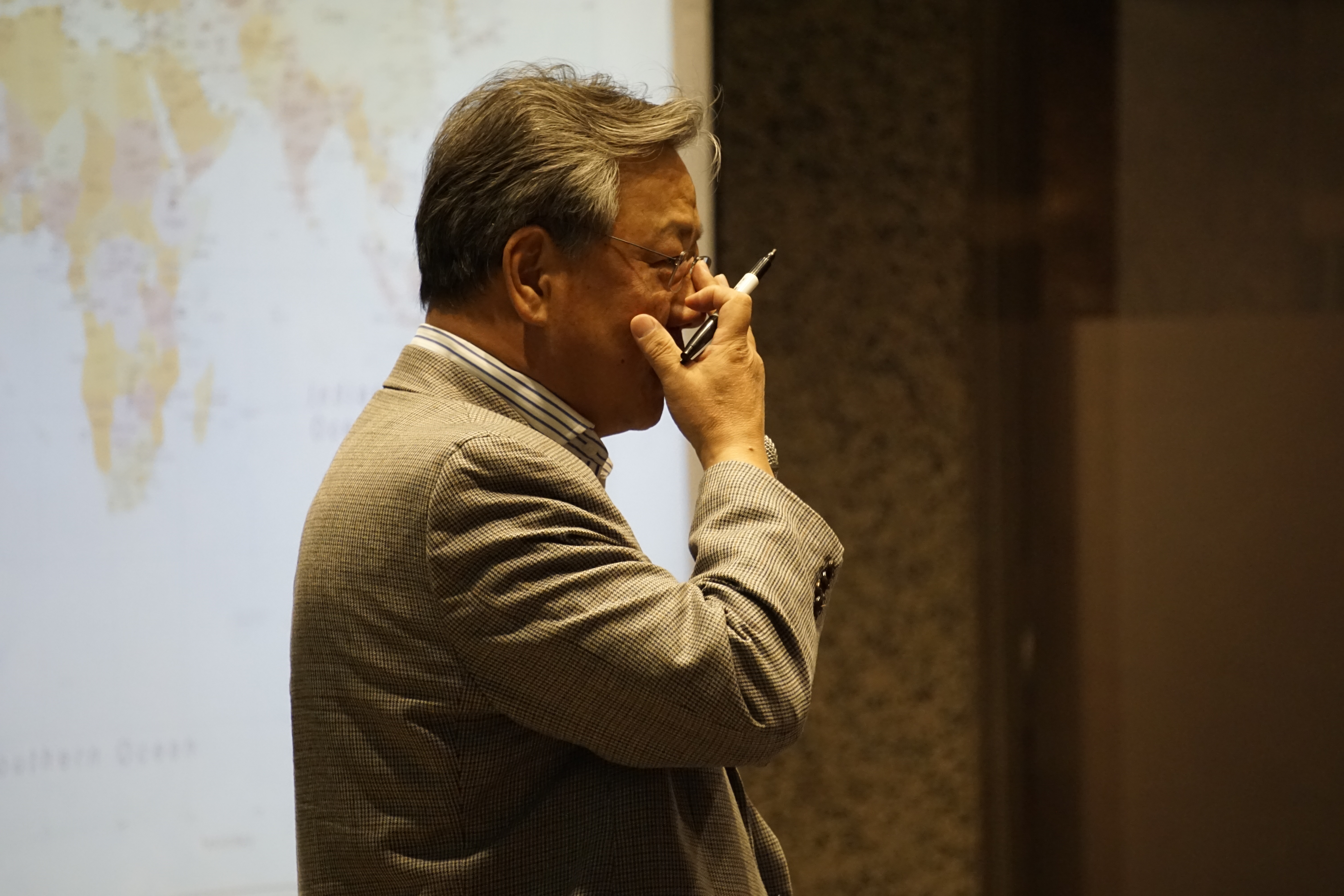 Монгол: Монгол улсын 21 дэх ерөнхий сайд Р.Амаржаргал NOUS уулзалтан дээр илтгэл тавив